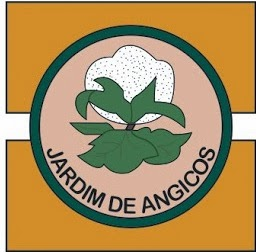 Brasão de Jardim de Angicos, Rio Grande do Norte, Brasil.